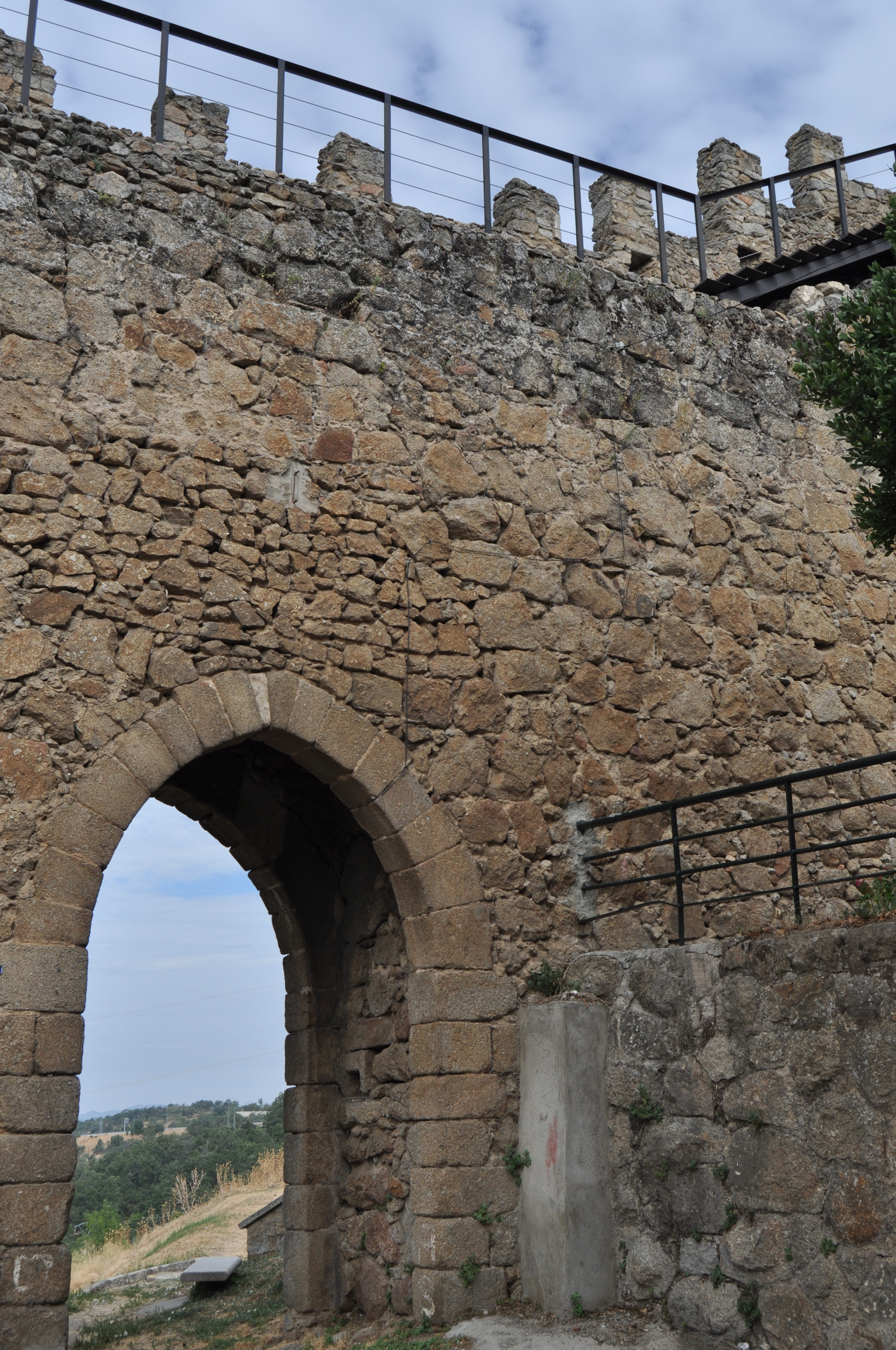 Bejar - 041